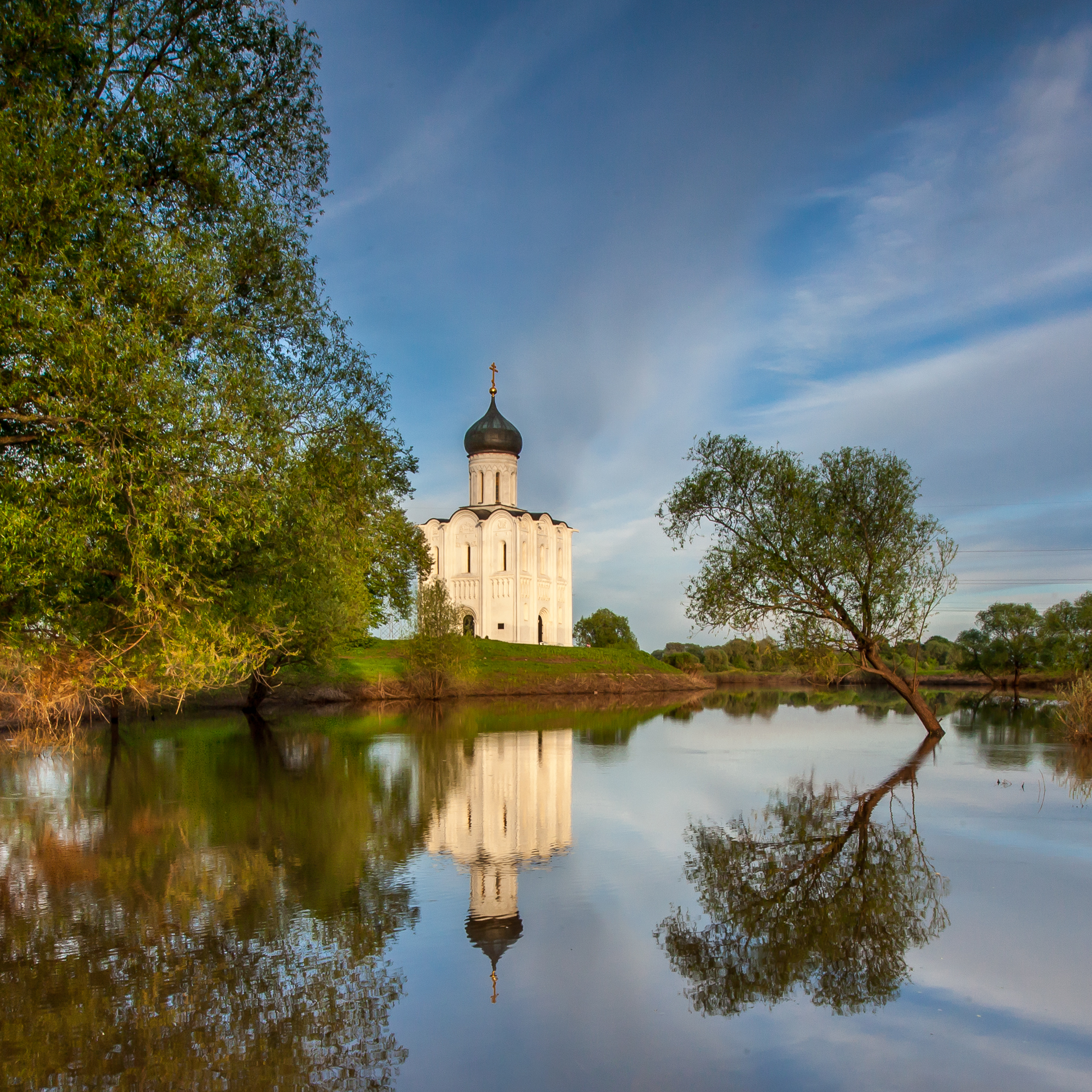 Боголюбовский луг – церковь Покрова на Нерли, Суздальский район This image is related to the protected area of Russia number 3310248